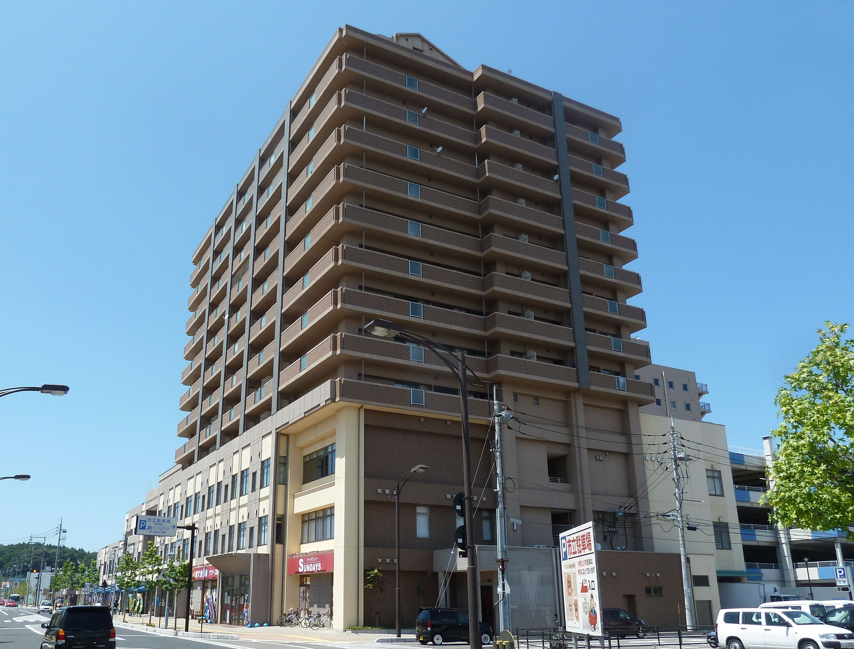 益田駅前にあるEAGA